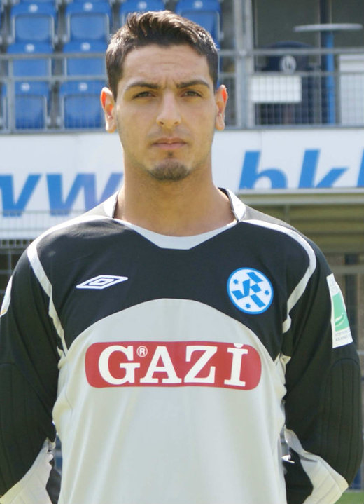 Günay Güvenc im Trikot der Stuttgarter Kickers